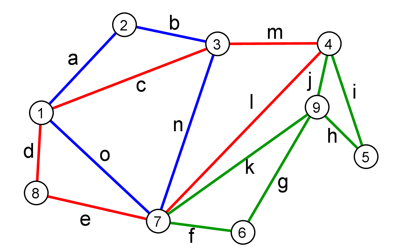 Hierholzer's algorithm